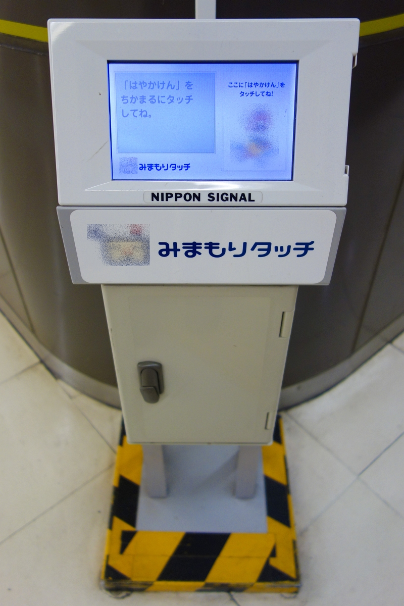 みまもりタッチ （日本信号製、博多駅）